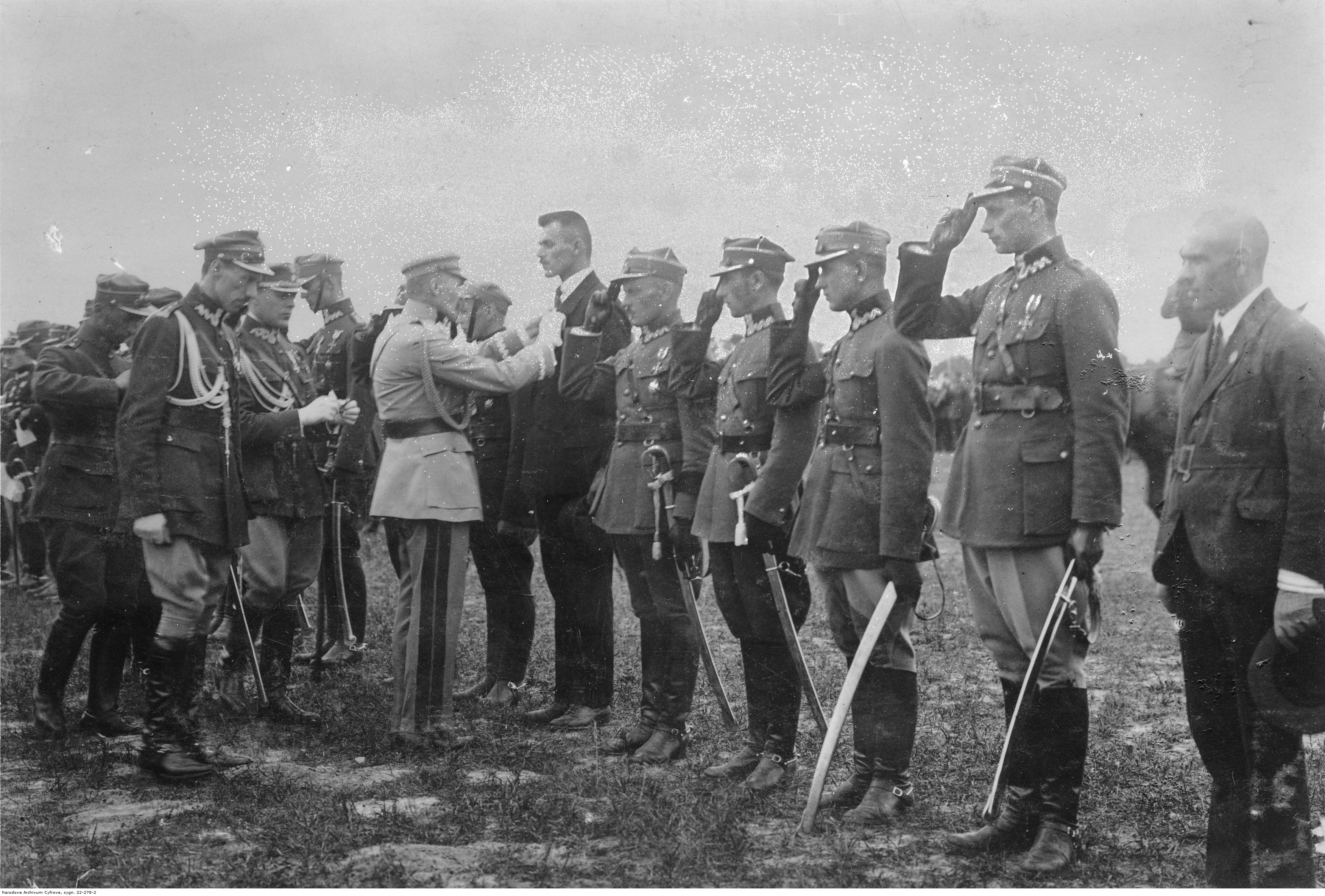 Marszałek Józef Piłsudski dokonuje aktu dekoracji byłego oficera. Widoczni m.in.: (prawdopodobnie) były dowódca Brygady Syberyjskiej płk Kazimierz Rumsza (1. z prawej, w marynarce) i adiutant Naczelnego Wodza ppłk Bogusław Miedziński (2. z lewej).